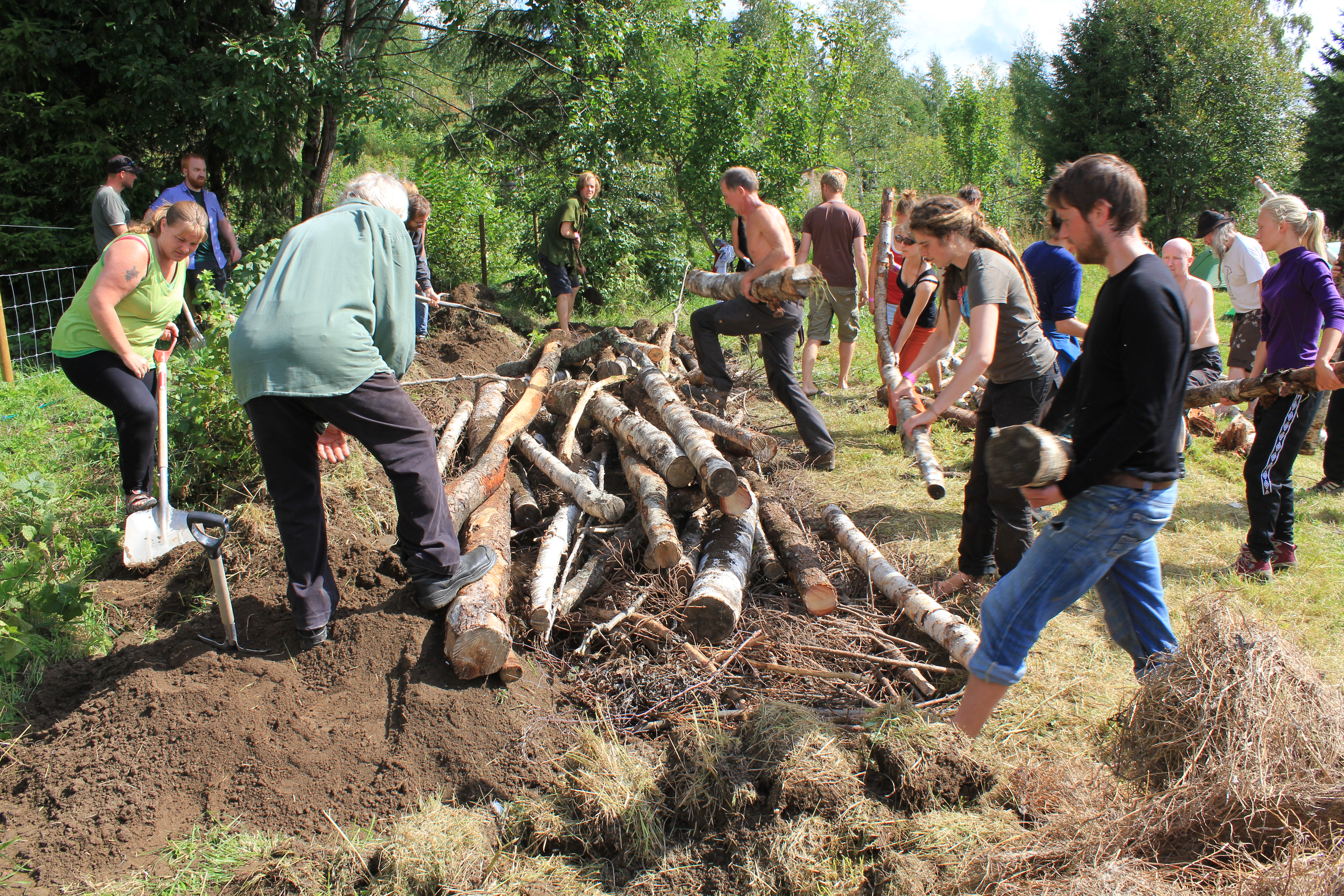 Fra Hurdal økolandsby og den skandinaviske permakulturfestivalen i 2013.